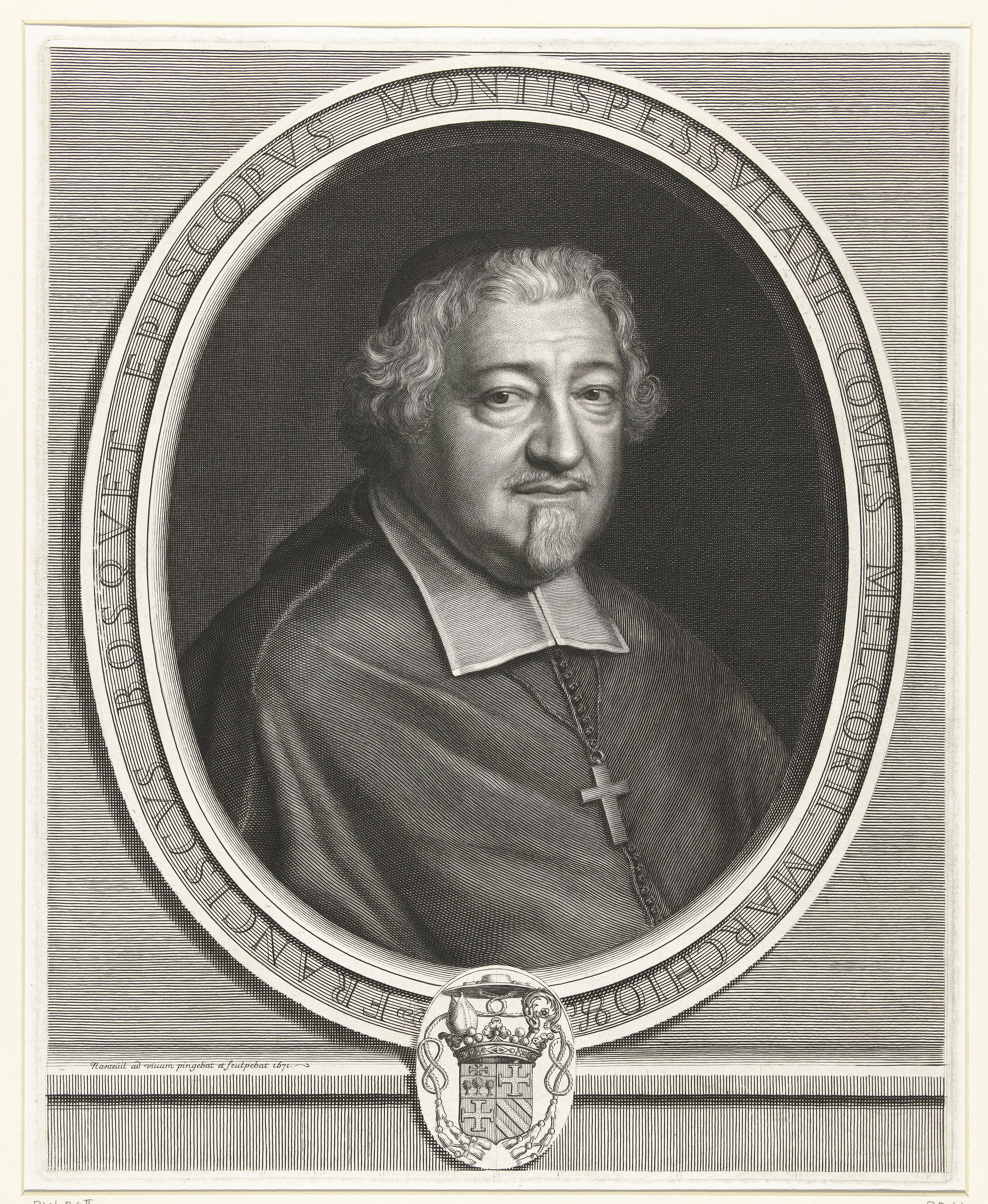 IdentificatieTitel(s): Portret van François BosquetObjecttype: prent Objectnummer: RP-P-OB-21.183Catalogusreferentie: Robert-Dumesnil 44-2(2)Petitjean & Wickert 24-2(2)Opschriften / Merken: verzamelaarsmerk, verso linksonder, gestempeld: Lugt 240Omschrijving: Portret van François Bosquet, bisschop van Montpellier, driekwart naar rechts. Een ovale omlijsting met tekst, onderaan een wapen.VervaardigingVervaardiger: prentmaker: Robert Nanteuil (vermeld op object)naar eigen ontwerp van: Robert NanteuilPlaats vervaardiging: FrankrijkDatering: 1671Fysieke kenmerken: gravureMateriaal: papier Techniek: graveren (drukprocedé)Afmetingen: plaatrand: h 400 mm × b 320 mmOnderwerpWie: François BosquetVerwerving en rechtenVerwerving: overdracht van beheer 1816Copyright: Publiek domein